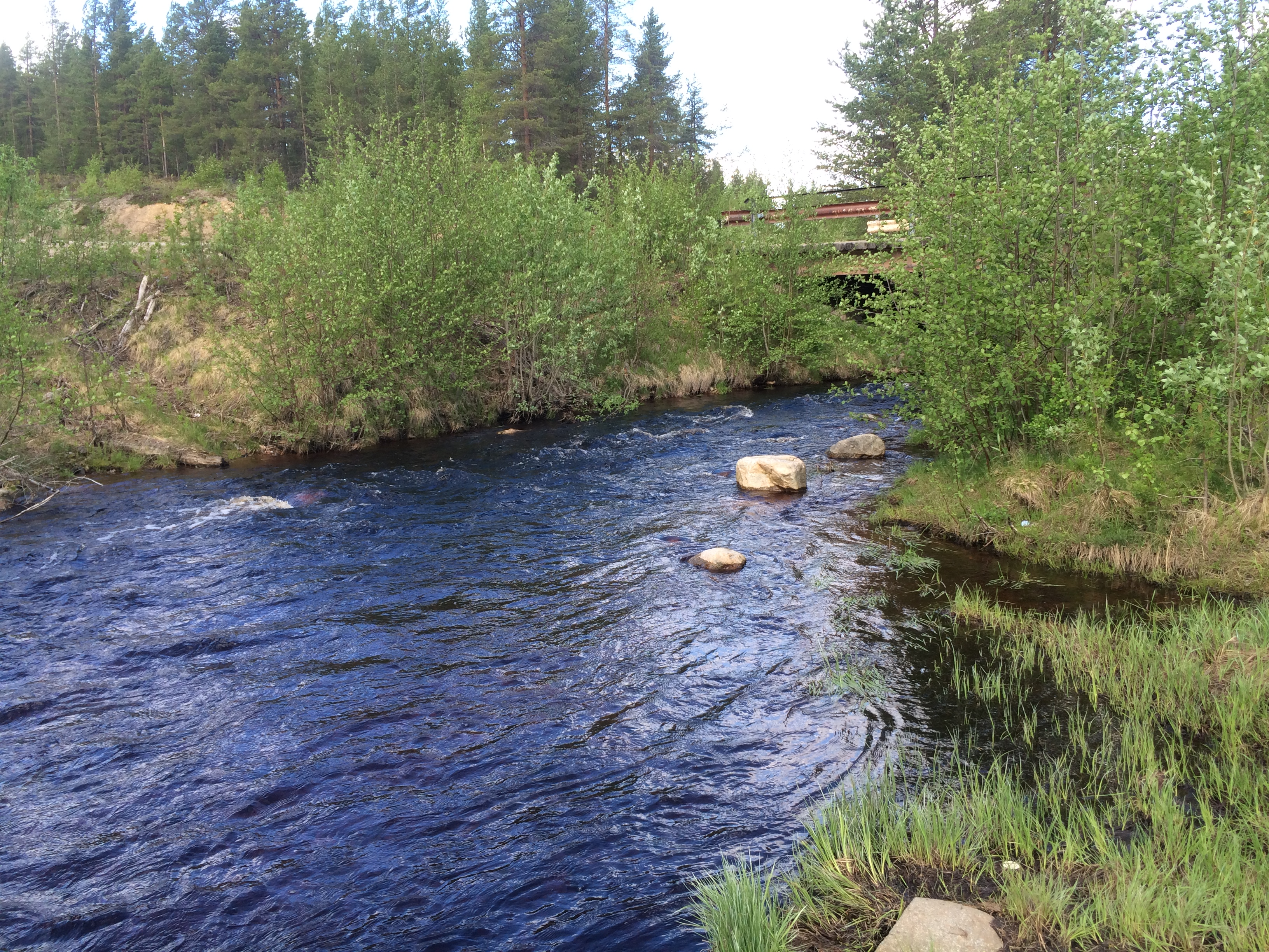 руч. Тулинец